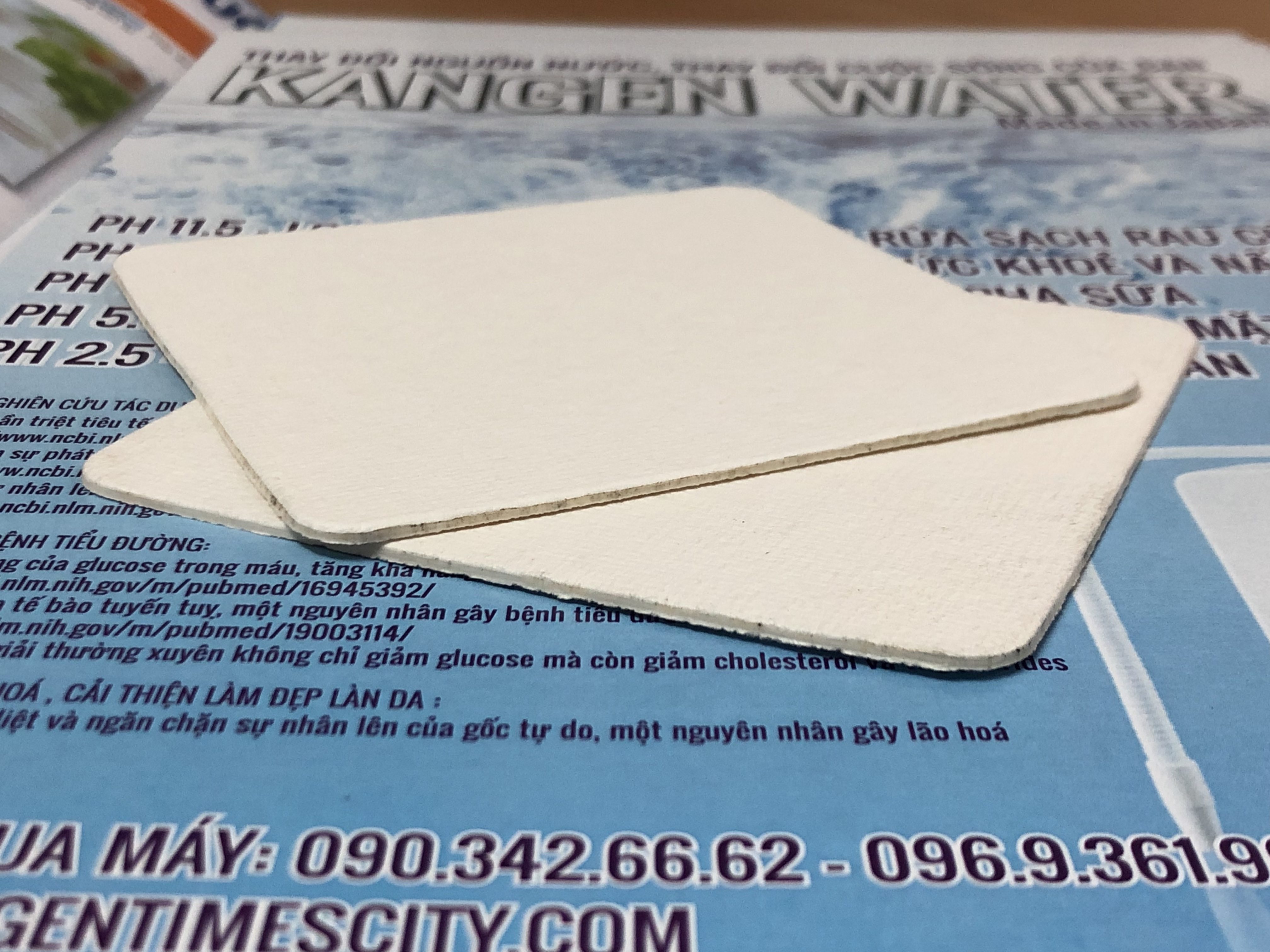 Giấy lót li